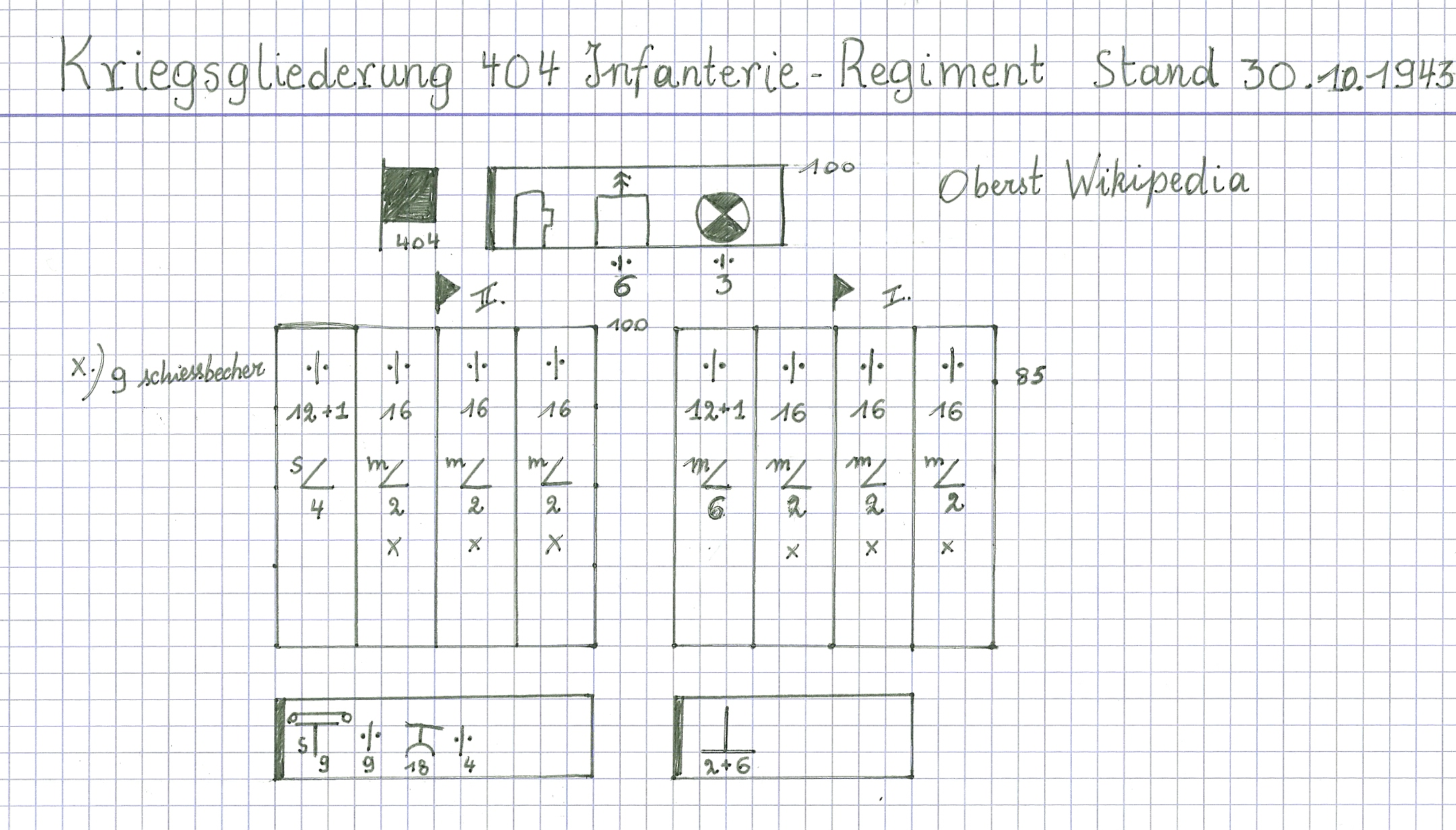 KriegsGliederung Infantrie Rgt 30 nov 1943